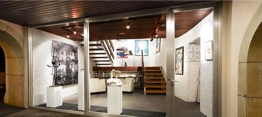 Accueil de la Galerie 2016